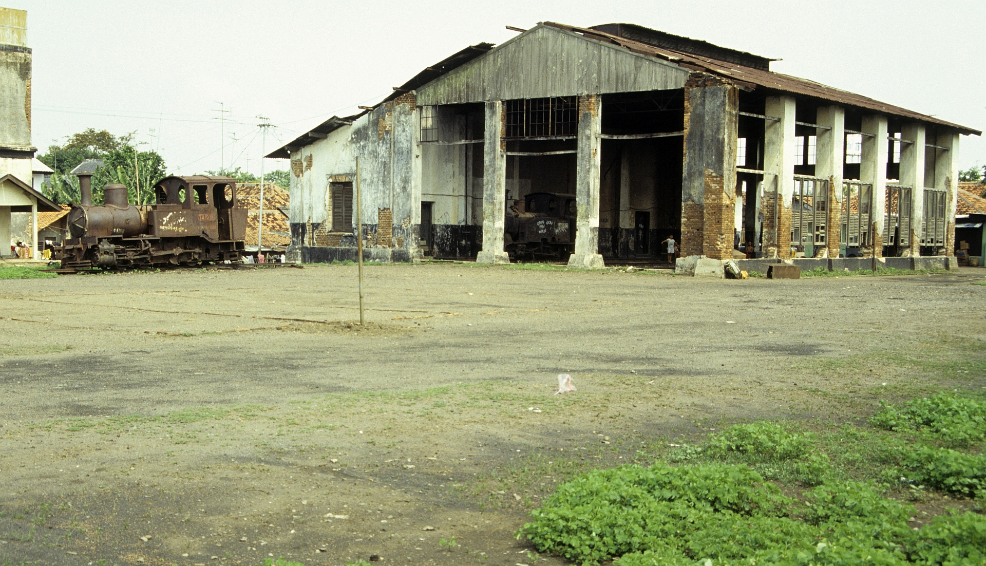 DKA TD10 (10 01 A)